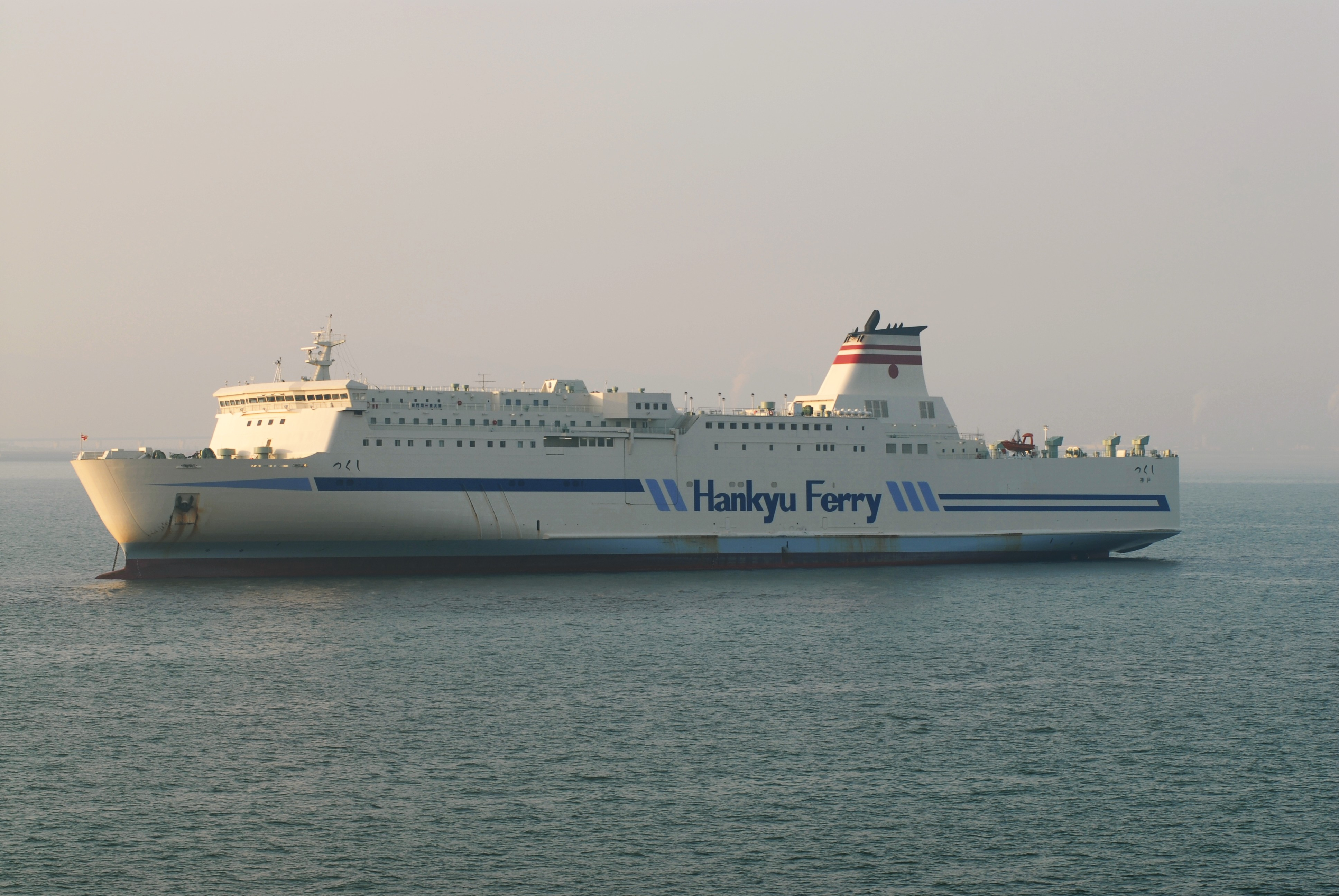 新門司港沖・沖出し中の阪九フェリー・つくし